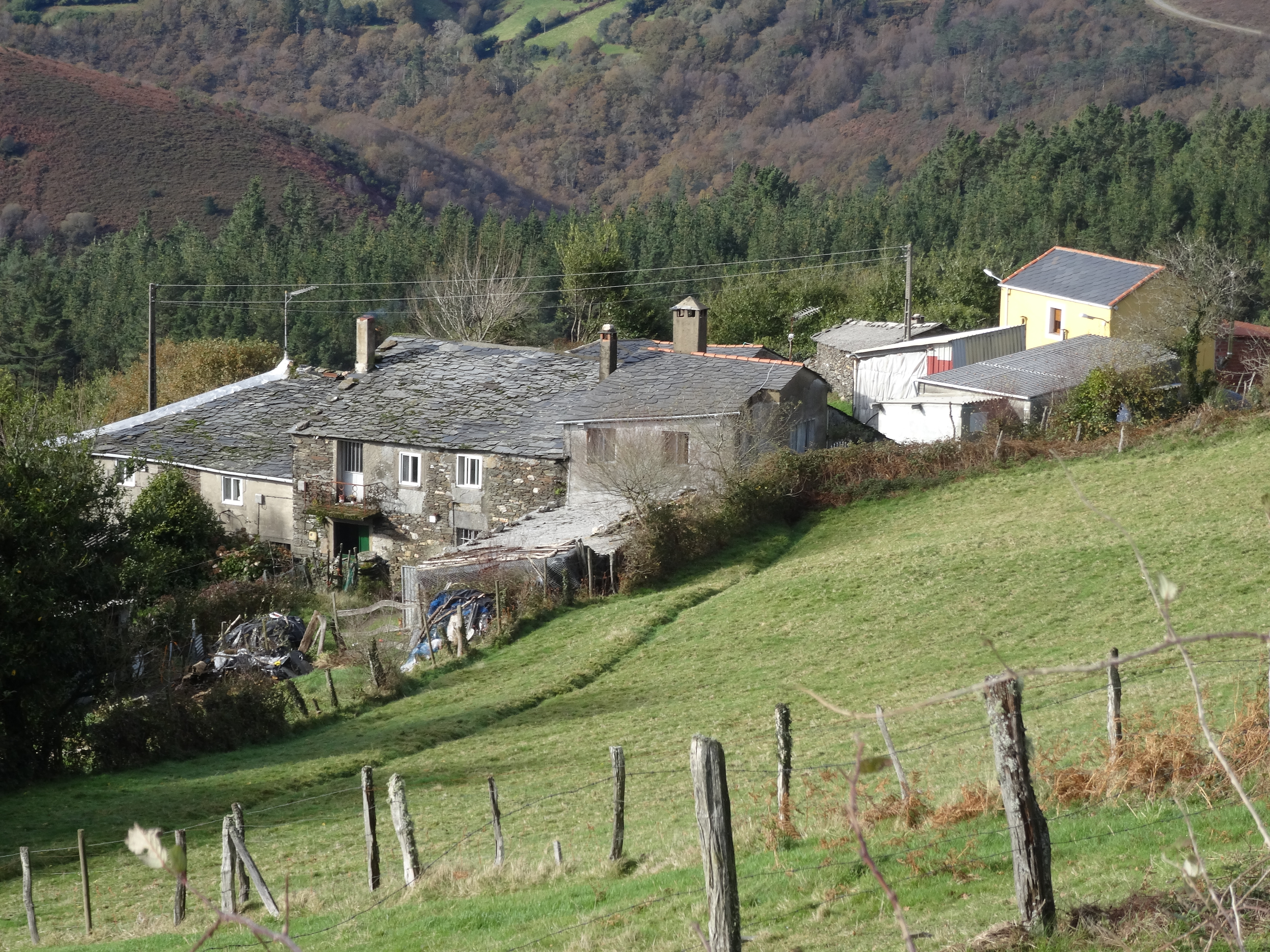 Ver título.